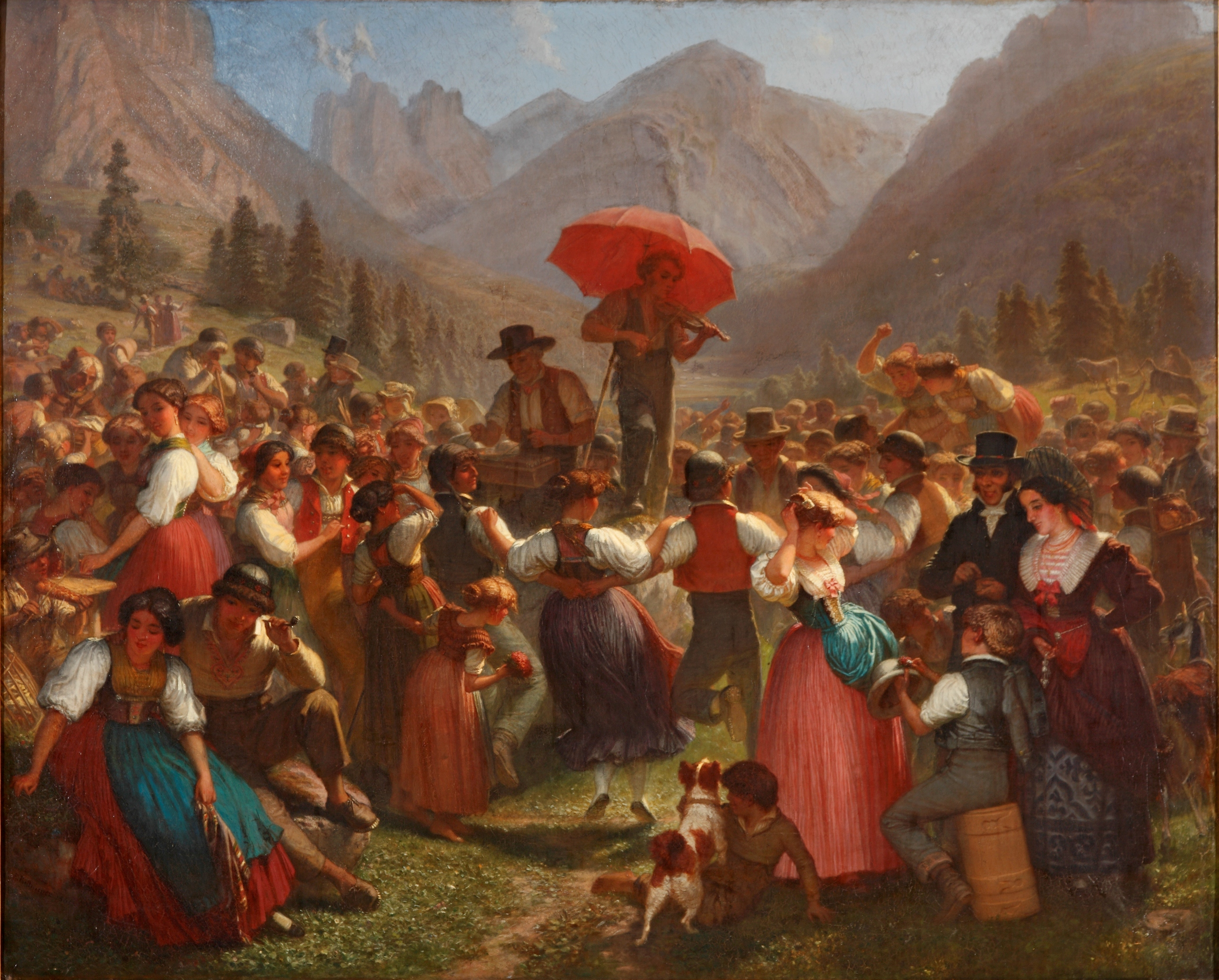 Emil Rittmeyer (1820-1904), Stubete auf Alp Sol, 1865, Öl auf Leinwand, 114 x 142 cm, erworben vom Kunstverein St. Gallen 1865